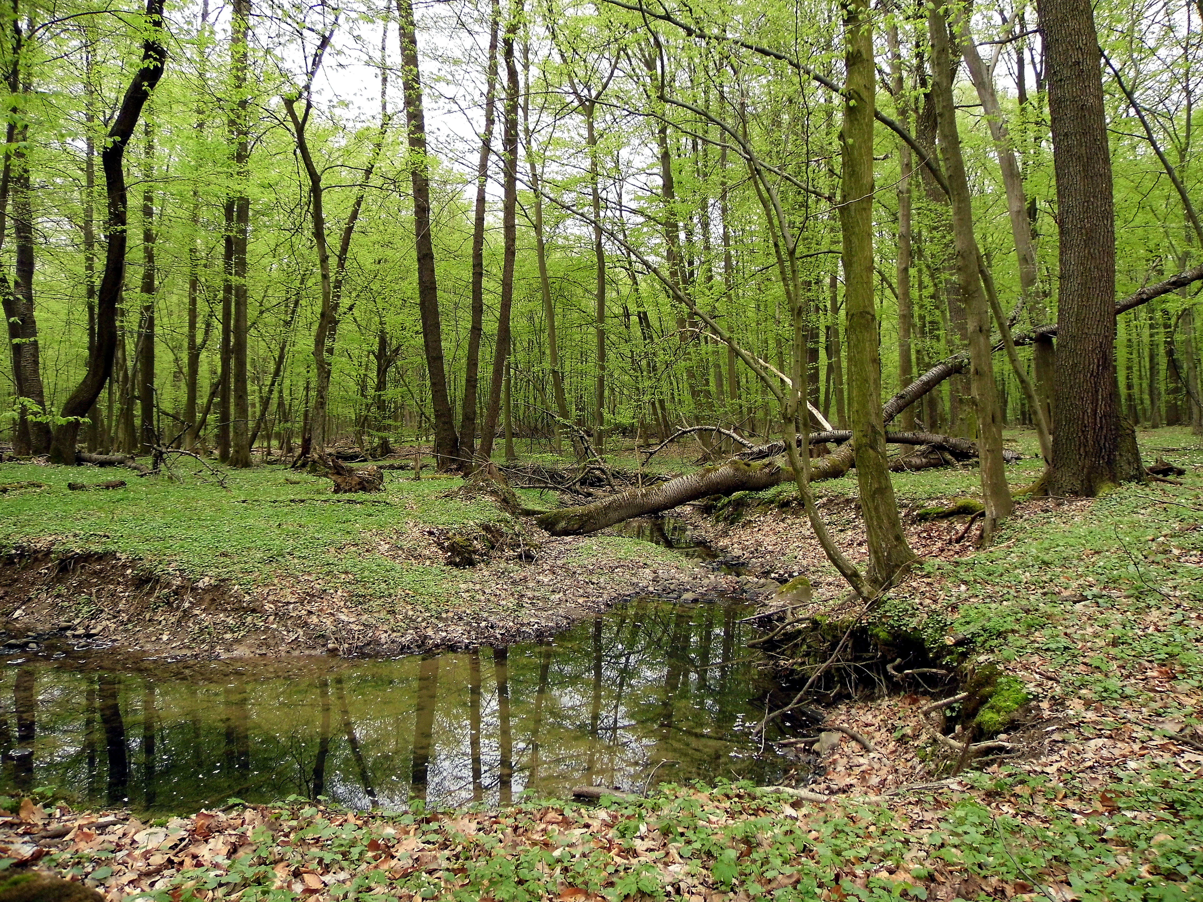 gymeš